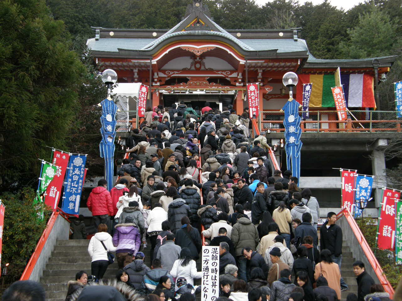 成田山法輪寺 成田山法輪寺（なりたさんほうりんじ）は、兵庫県西脇市小坂町向山にある寺院。兵庫県内では、唯一、大本山成田山新勝寺から認可を受け播州西脇成田山を名乗っている。